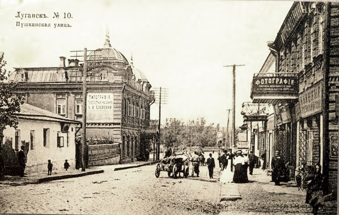 Пушкинская улица